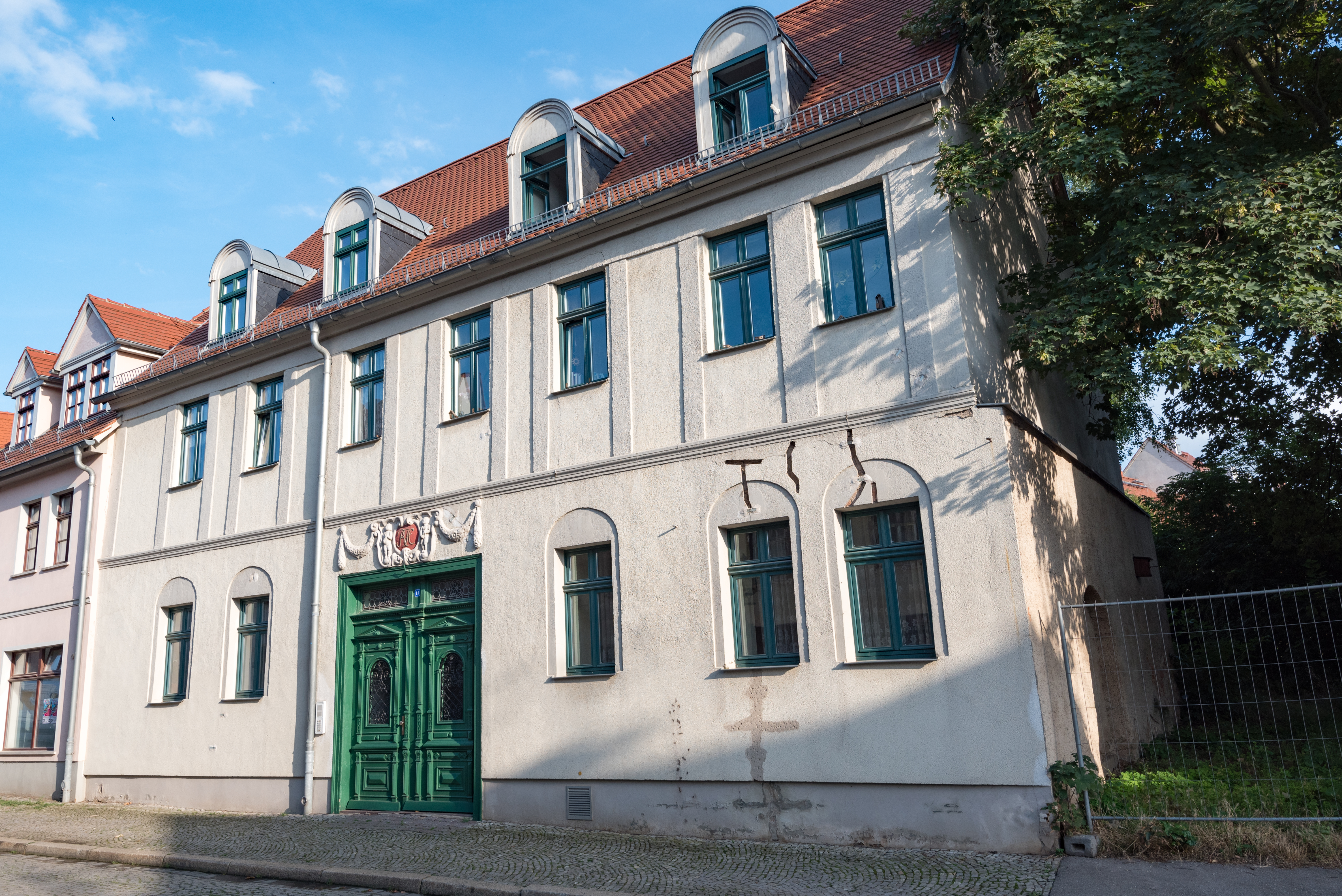 Naumburg (Saale), Wenzelsgasse 11